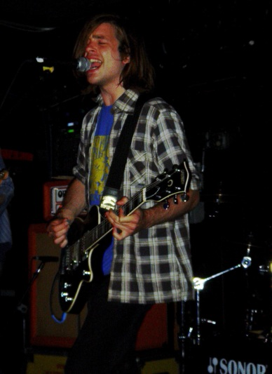 Sam Forrst